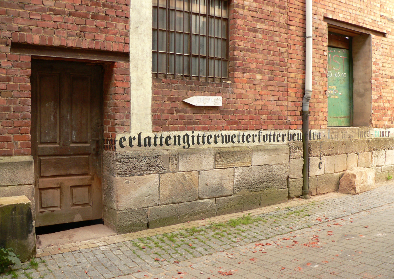 Eingang der Destille in Hann. Münden